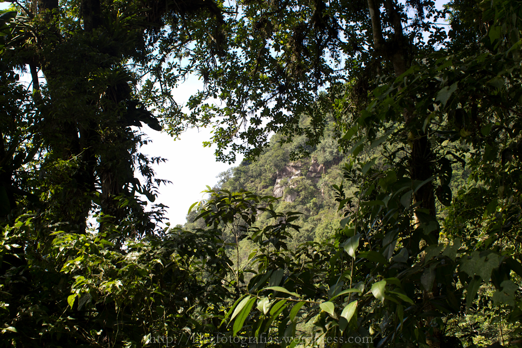 Exemplo da vegetação da Serra de Maranguape